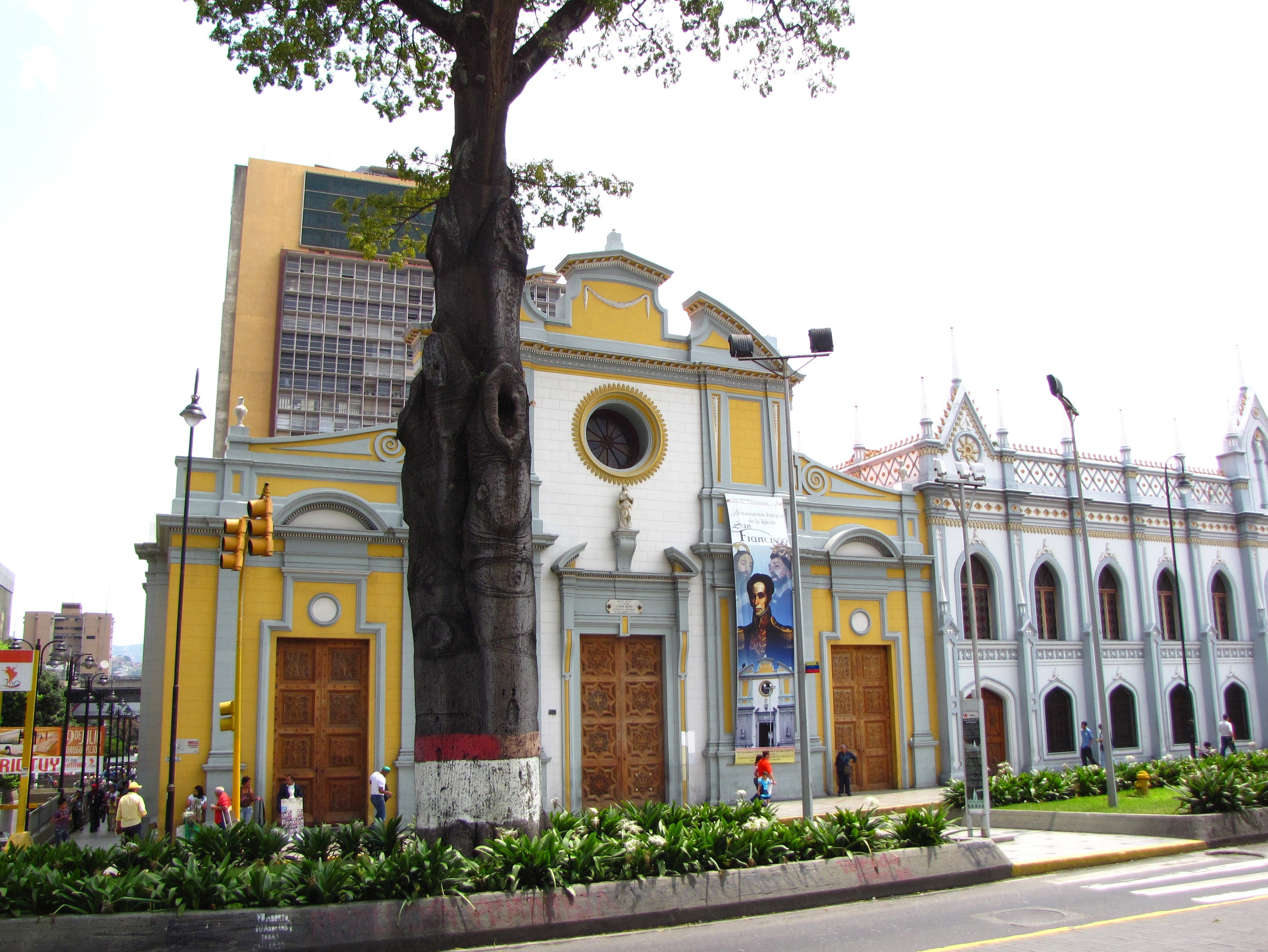 Iglesia de San Francisco Caracas Avenida Universidad. Caracas, Venezuela.